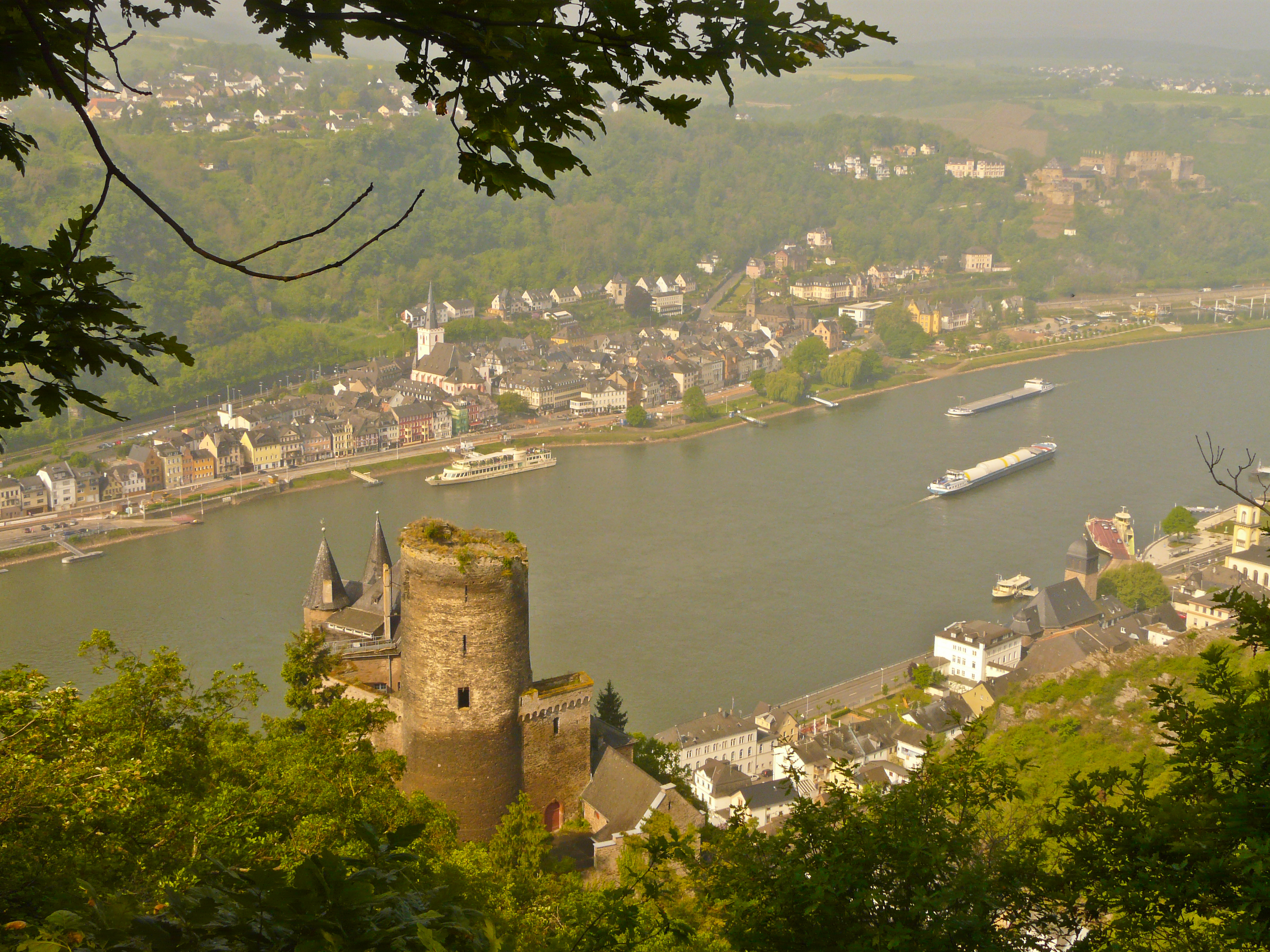 Blick vom Rheinsteig über Burg Katz (St. Goarshausen) auf Sankt Goar auf der linken Rheinseite